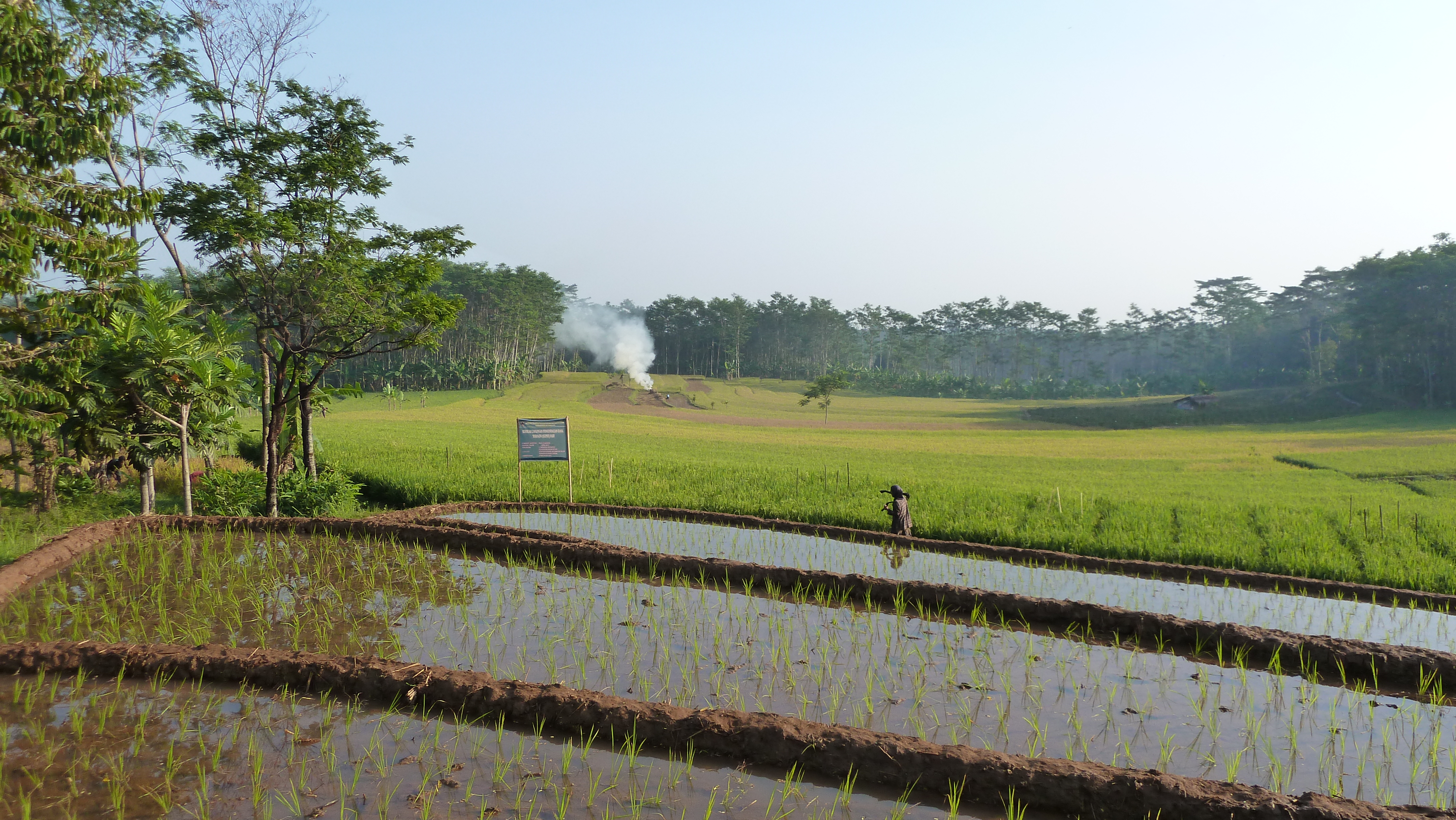 Persawahan di Batursari